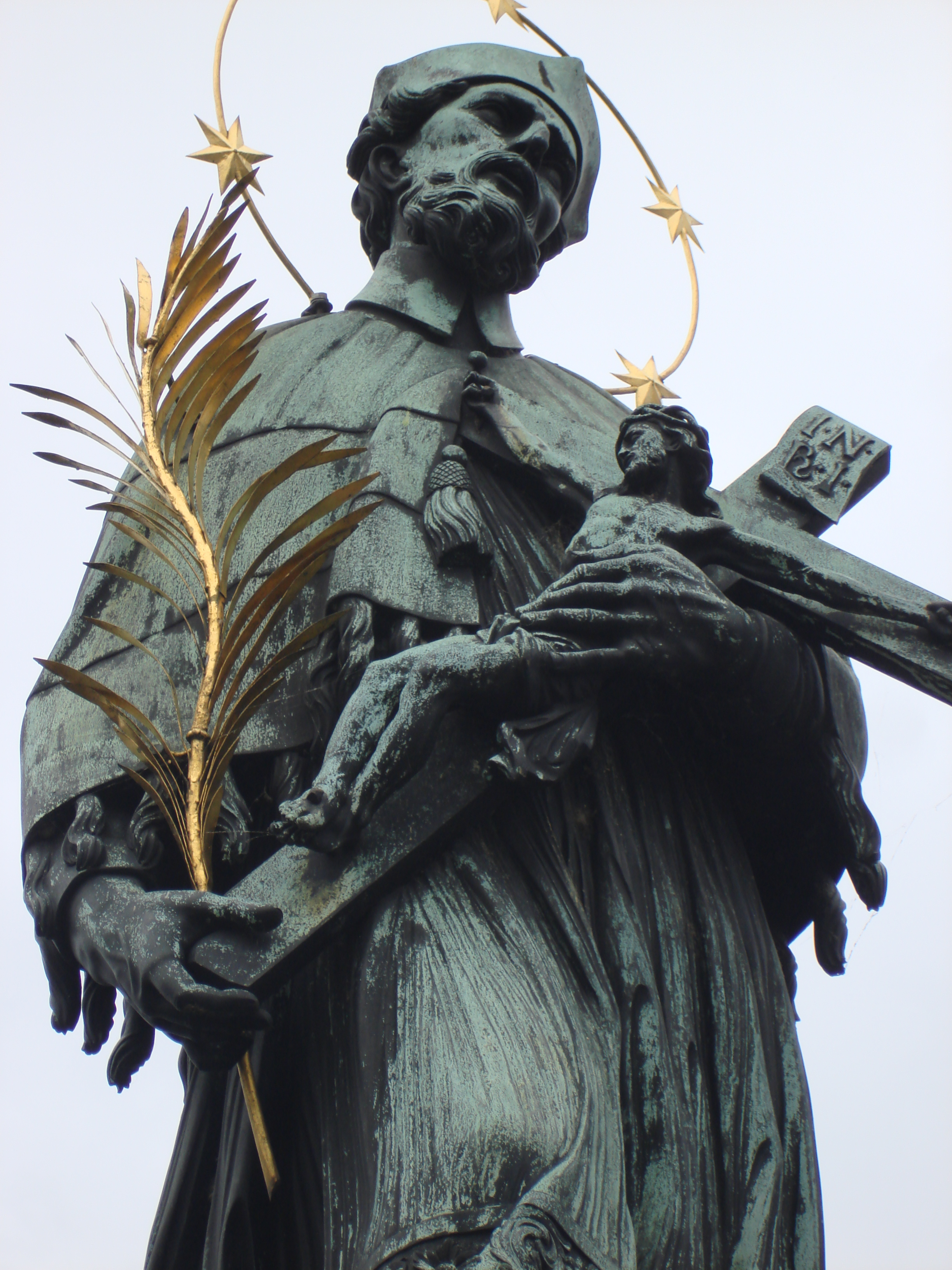 Praga